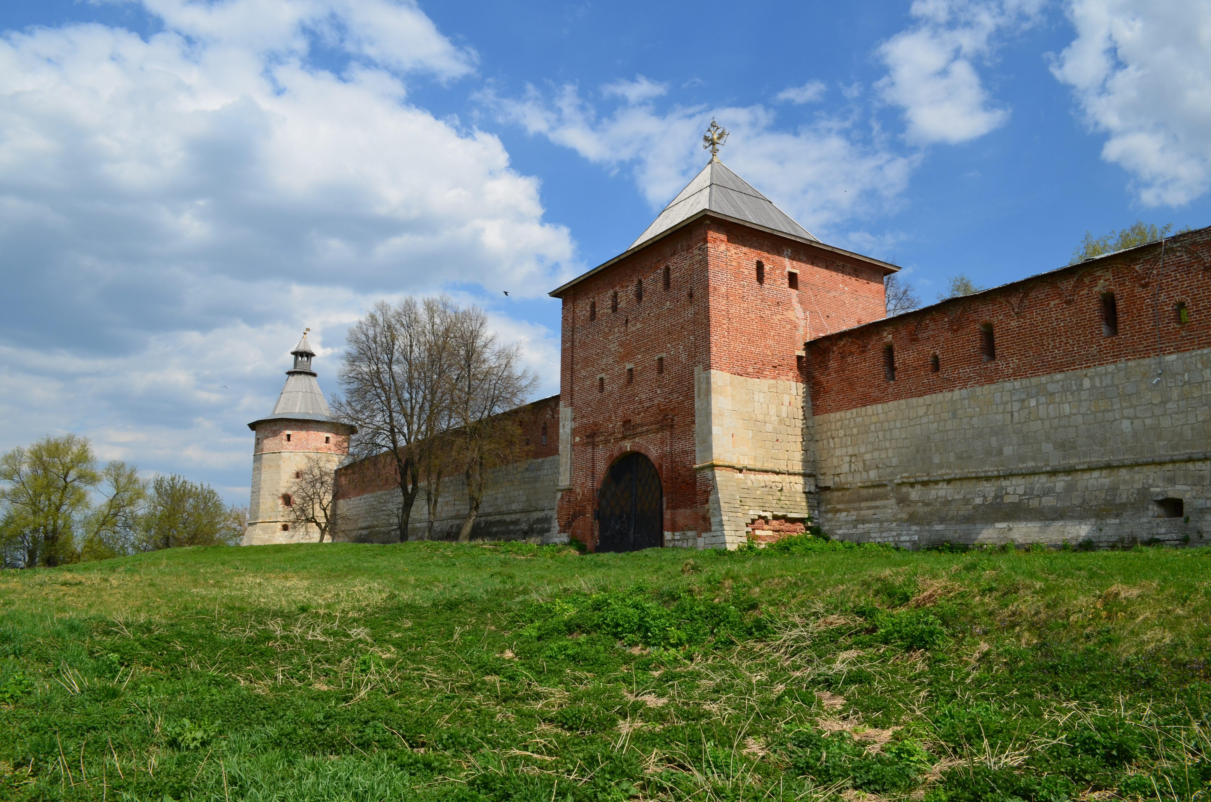 Зарайский кремль.Караульная и Егорьевская башни.1528-1531 гг.